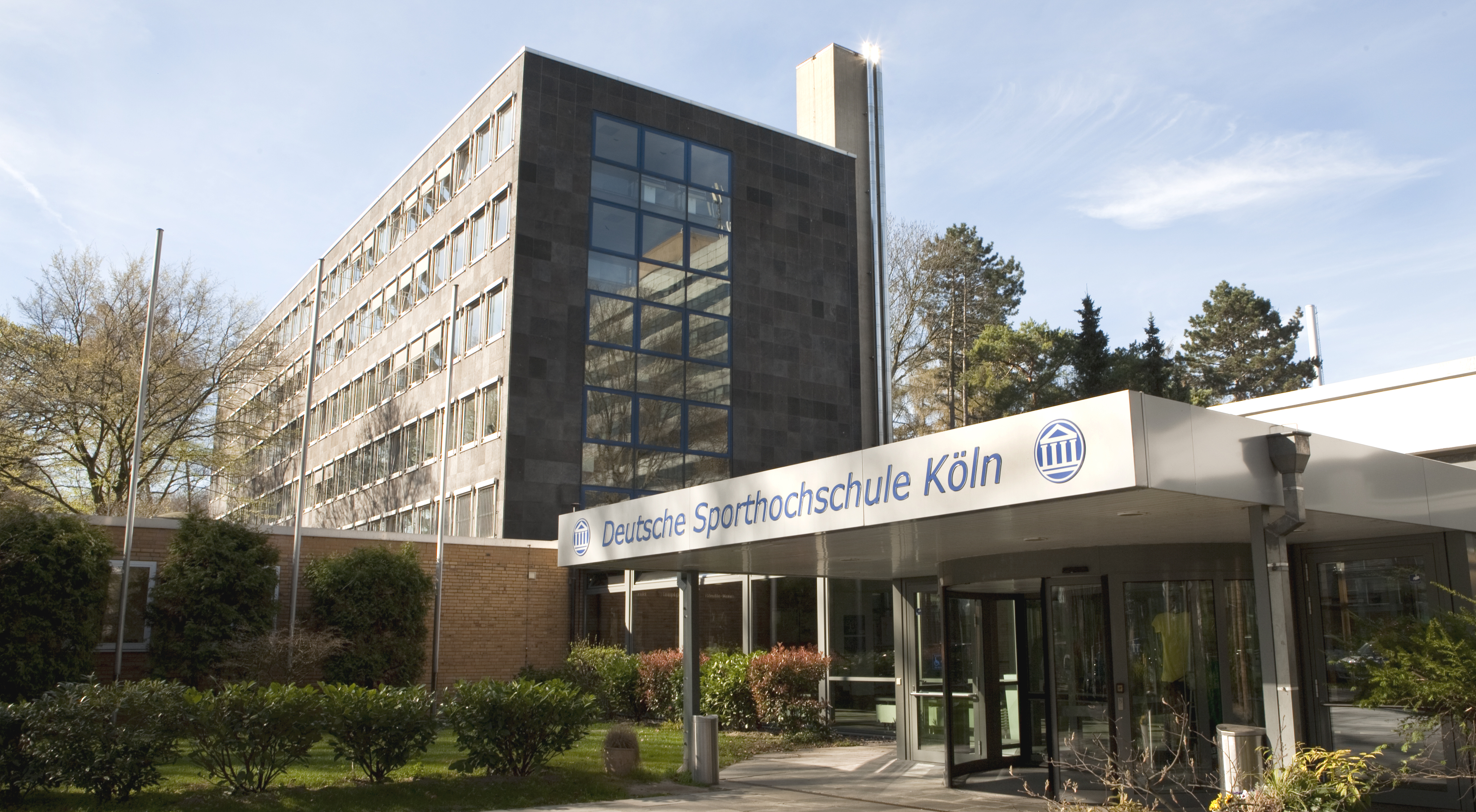 Haupteingang der Deutschen Sporthochschule Köln